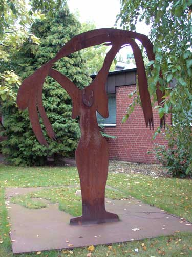 Bildbeschreibung: Pieta. Skulptur von Menashe Kadishman (Tel Aviv) vor dem Dominikanerkloster in Braunschweig Quelle: Fotograf/Zeichner: Hans-Albert Gunk OP Datum: 1999 Sonstiges